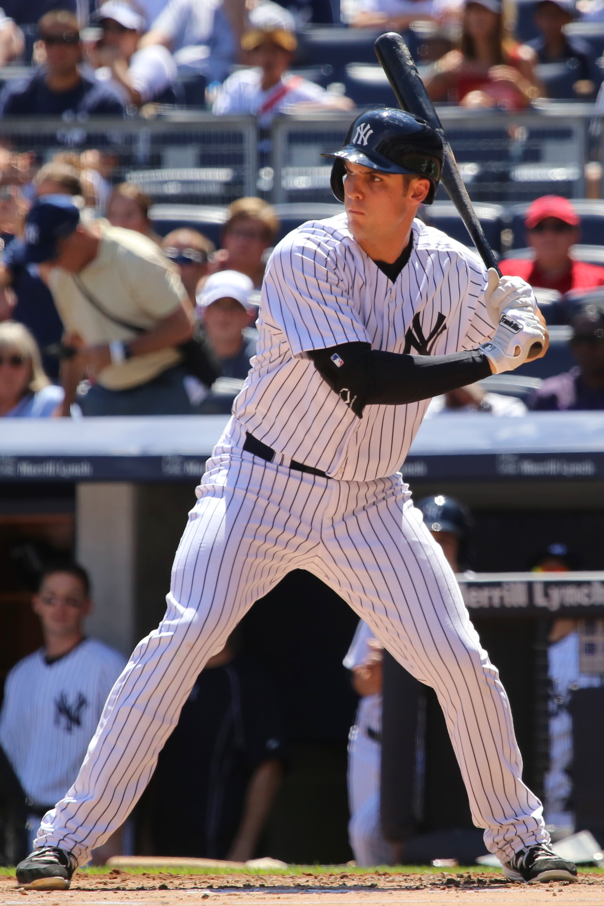 Greg Bird